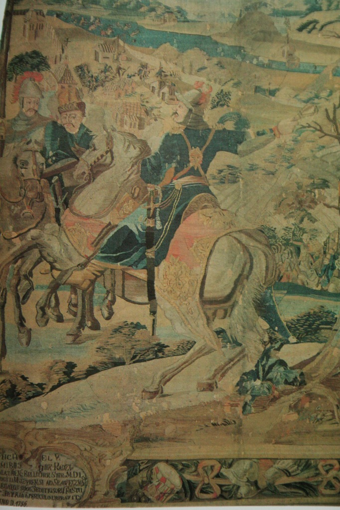 подавление восстания крестьян Каменщины, Мозырского повета, в 1756 году. Создавая это полотно, магнаты стремились увековечить для потомков подвиги князя Михаила V Казимира (Рыбоньки). Князь Михаил V по приказу польского короля Августа III послал на борьбу с повстанцами несколько отрядов казаков. Командовать этим войском приказал поручику Понятовскому, который успешно справился с поручением - восстание было задушено. Более 3000 крестьян погибло в неравной битве. На переднем плане гобелена - высокий курган, над которым будто бы парит фигура всадника на вздыбленном коне, убранным в богатую сбрую, в расшитом чепраке. Всадник - поручик Понятовский - в темно- синем кунтуше, желтых сапогах, в шлеме, украшенном пучком красных страусовых перьев. Интересно отметить, что на боку у него висит именно палаш с прямым клинком, а не традиционная сабля. Правой рукою он указывает двум кавалеристам на поля и реку Словечну (под Мозырем), где разыгрываются трагические сцены: радивилловская конница нагоняет кучку крестьян, которые стремятся перебраться на другой берег реки. По реке плывут трупы. Здесь же, на берегу, возле костела и отдельных разрушенных построек, небольшое количество повстанцев продолжает битву. Какой была вторая часть гобелена - неизвестно, нигде в литературе не осталось о ней записей.